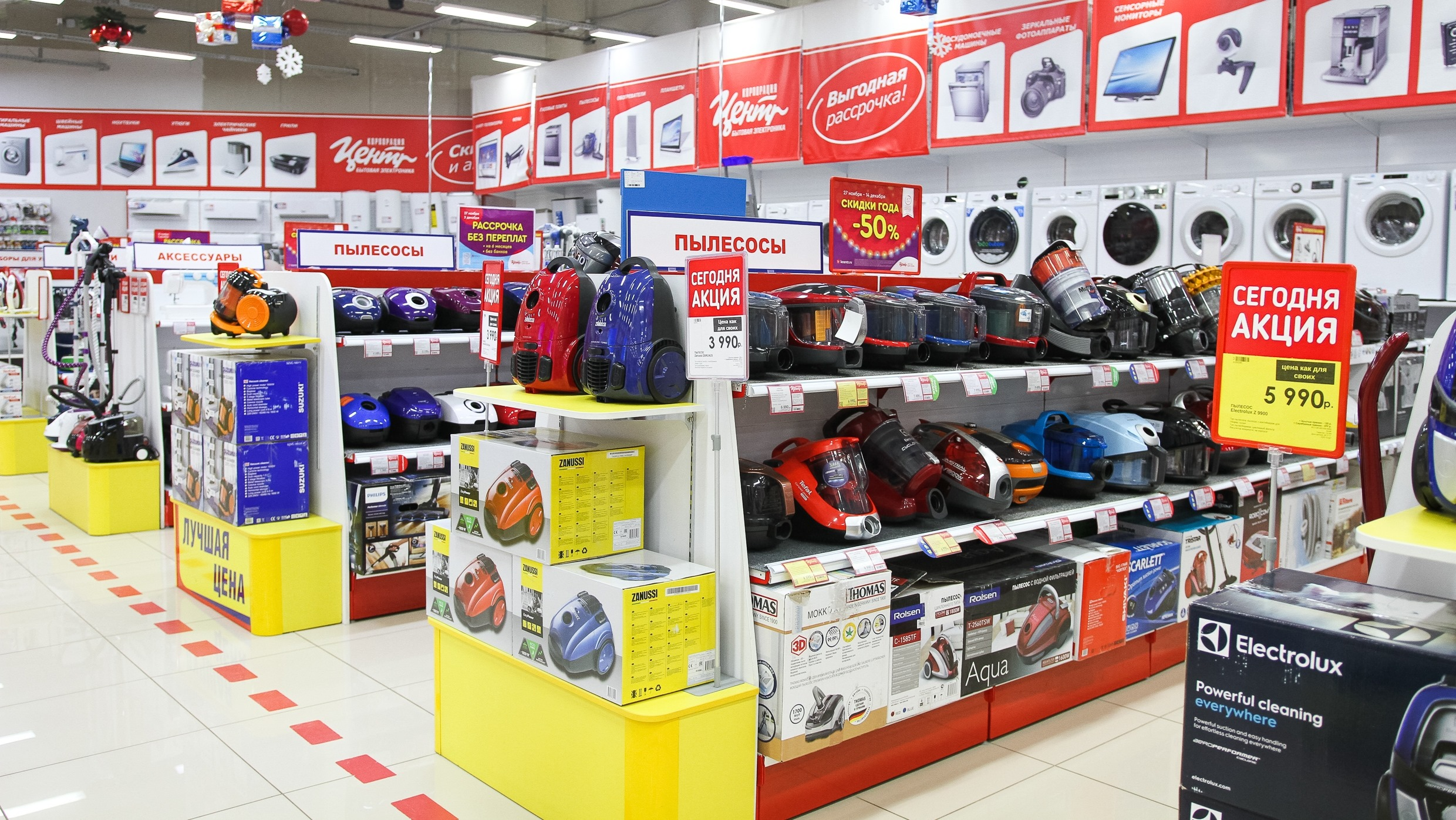 Вид магазинов Корпорация "Центр"